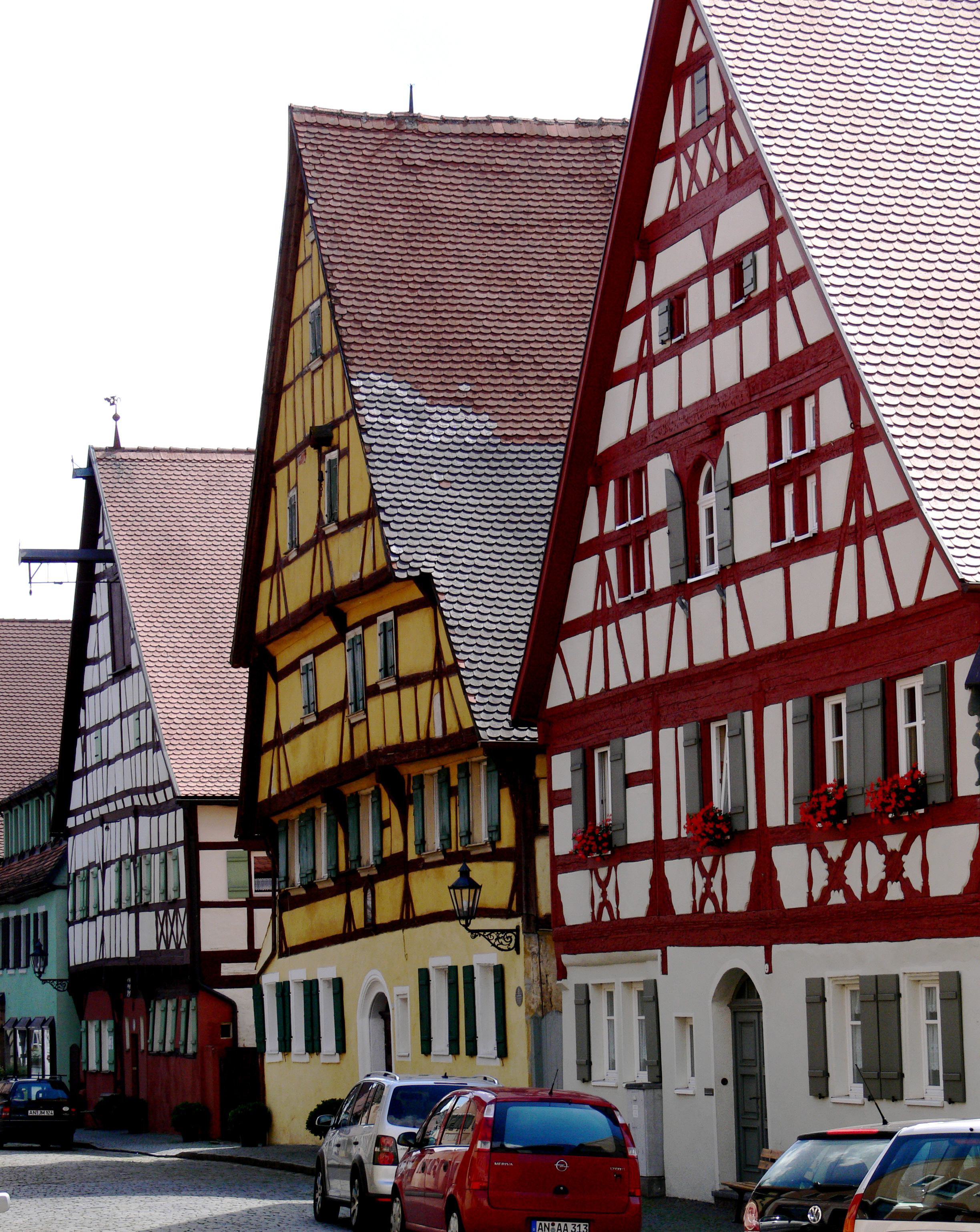 Wolframs-Eschenbach, Landkreis Ansbach Fachwerkhäuser in der Hauptstraße, ganz links Stadtschmiede, Mitte Lammswirtshaus (1410), rechts Kocherhaus (1686)